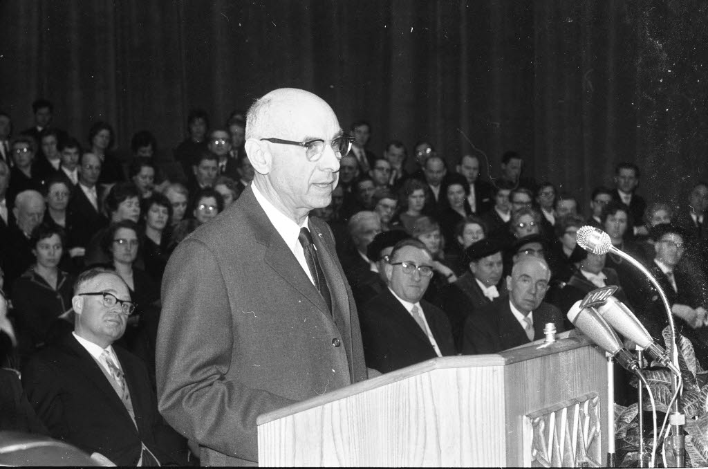 Festakt im Stadttheater. Im Bild Prof. Dr. Gerhard Colm aus Washington bei seiner Dankesrede für den Bernhard-Harms-Preis.